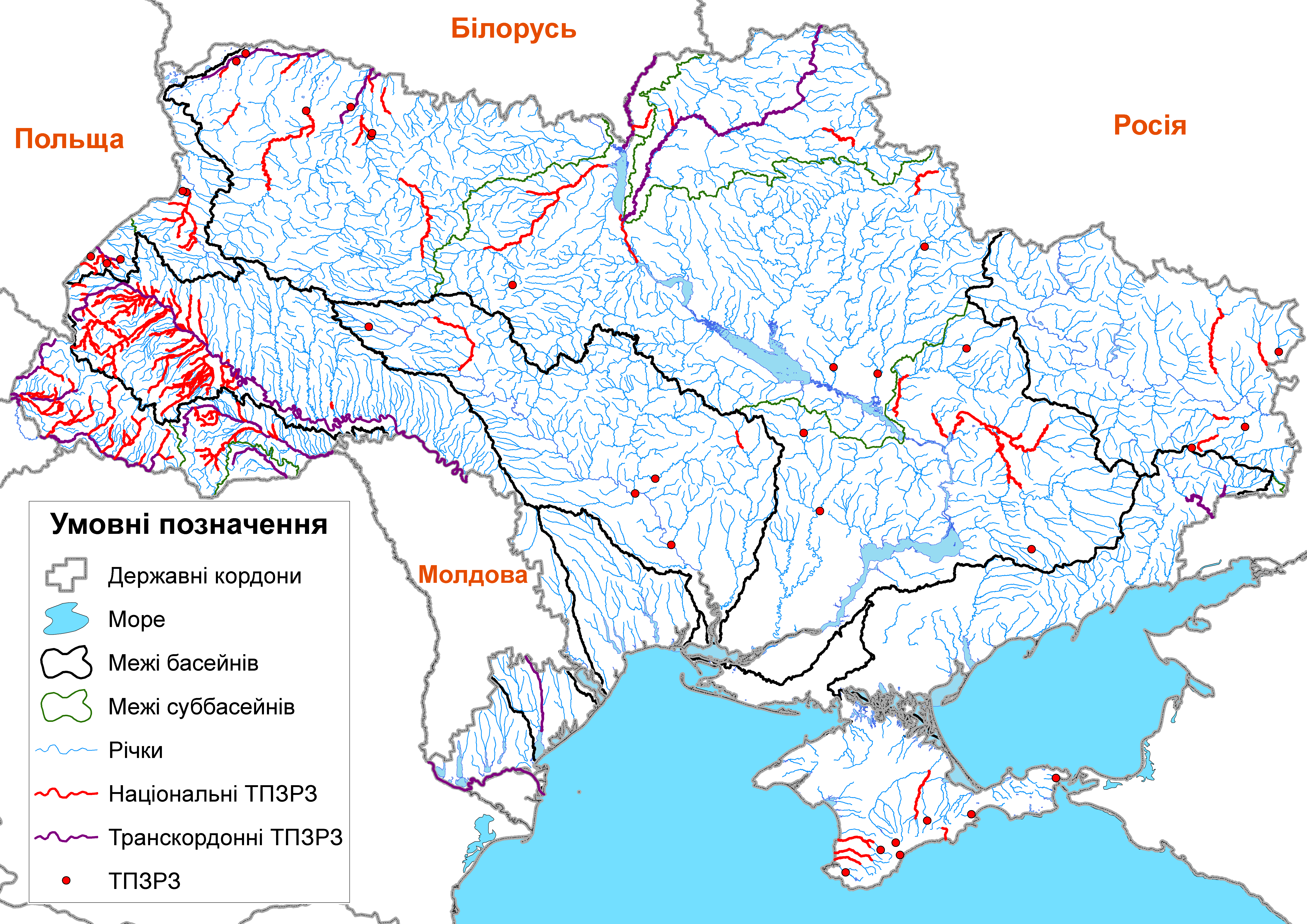 ТПЗРЗ України